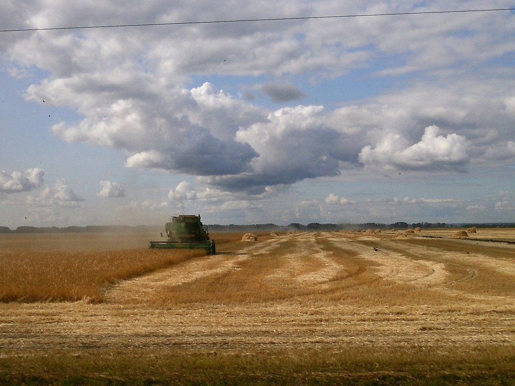 Уборка урожая недалеко от села Чувашский Сускан